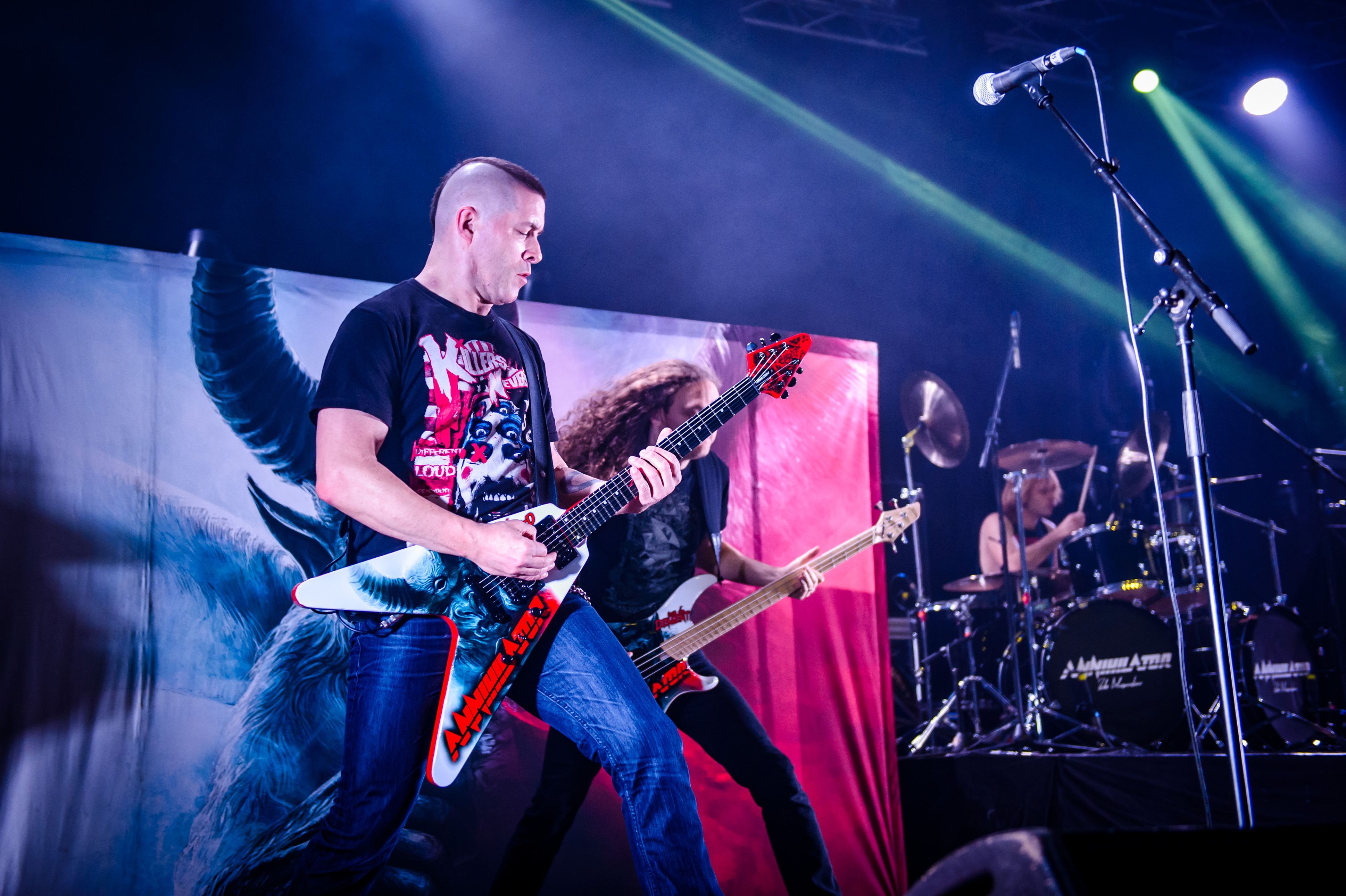 'Ruhrpott Metal Meeting 2017; Turbinenhalle Oberhausen': 'Annihilator'